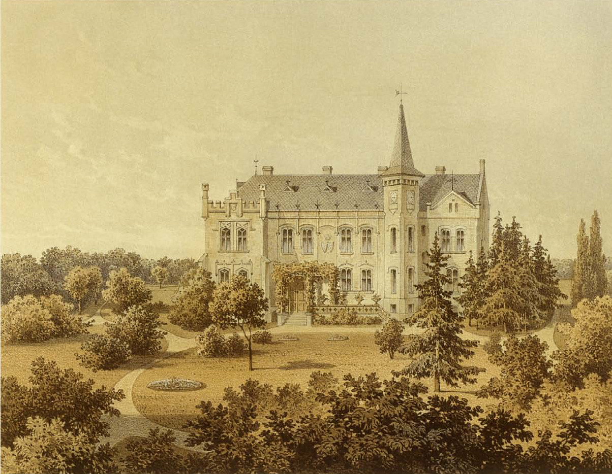 Haus Bögge in Bönen, Germany